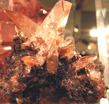 Fotografía de Pablo Alberto Salguero Quiles. Para ilustrar el artículo de macla